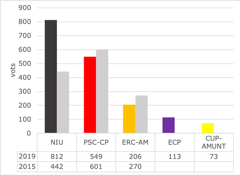 Resultat de les eleccions municipals a Cànoves l'any 2019